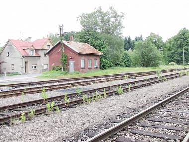 Tato budova je nefunkční. Je to část budovy, která zde zůstala. Další budova se nachází kousek od cihlové budovy.